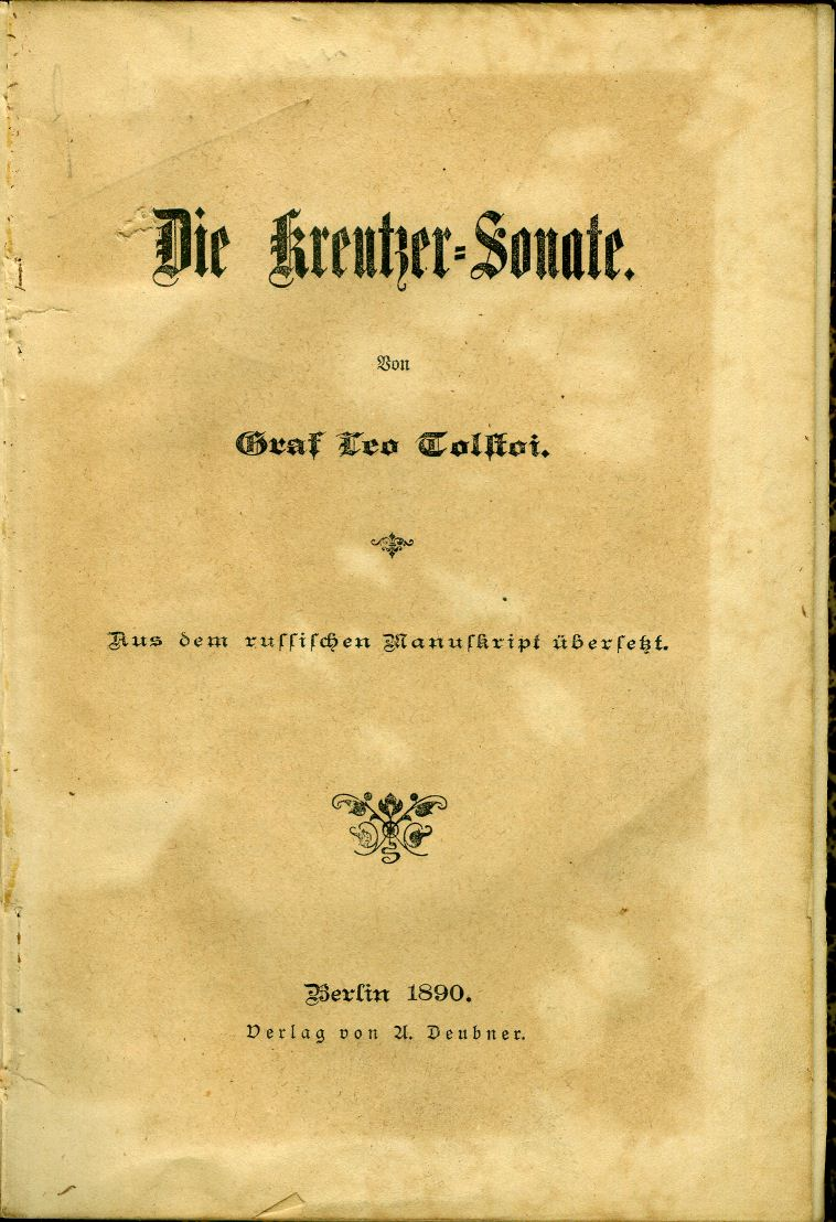 Scan des Titelblattes aus dem Jahre 1890 von Tolstoi's "Kreutzer-Sonate"